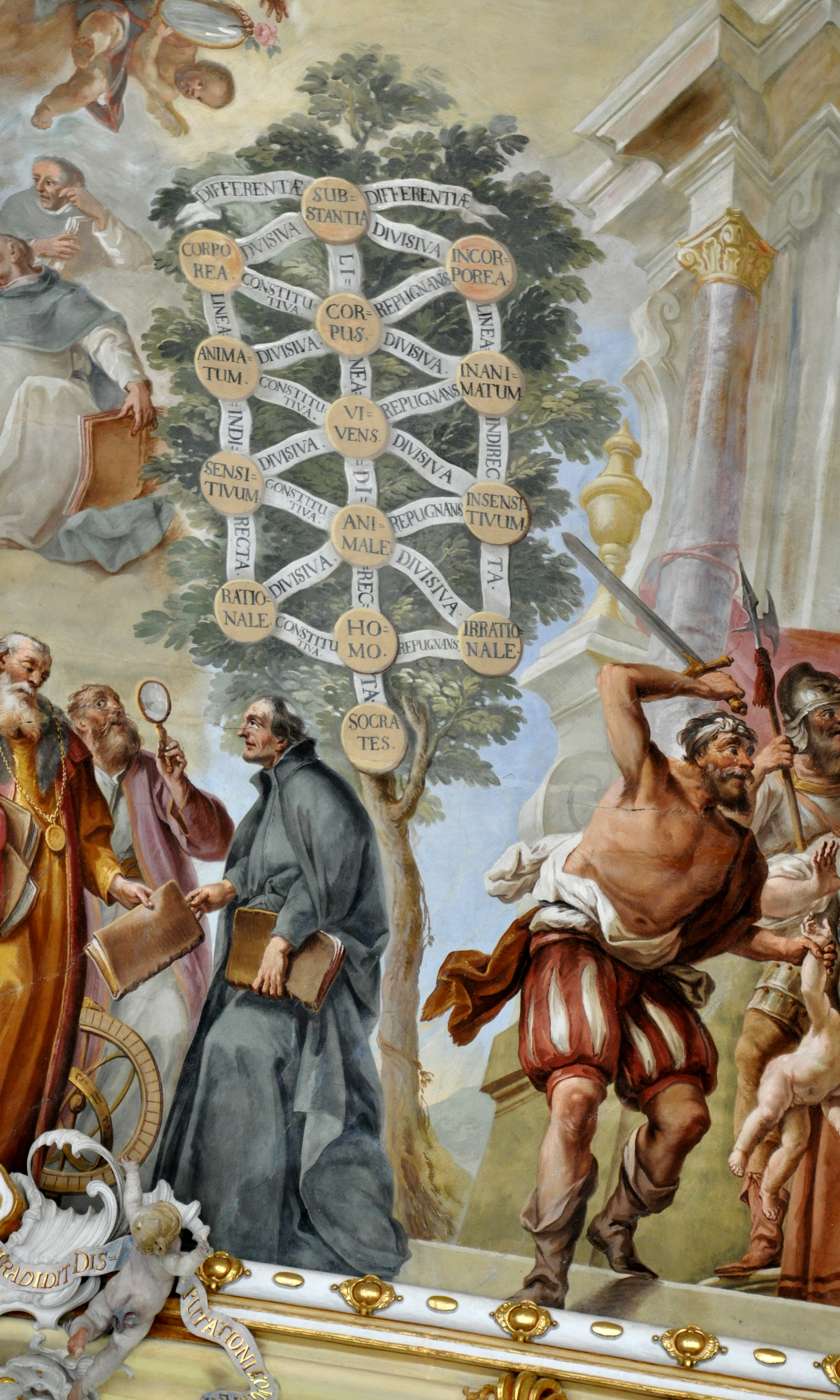 Bad Schussenried, Kloster Schussenried, Neuer Konventsbau, Bibliothekssaal Deckenfresko, Ausschnitt: Baum des Porphyrius